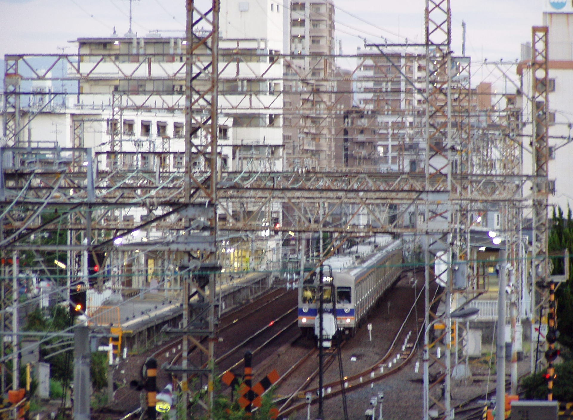 Osaka. Nankai Koyasan Line Sumiyoshi-Higashi station.